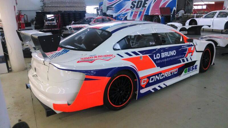 Prototipo Top Race Series, símil Volkswagen Passat CC, presentado en los primeros días del año 2014. Piloto: Eduardo Maidana.